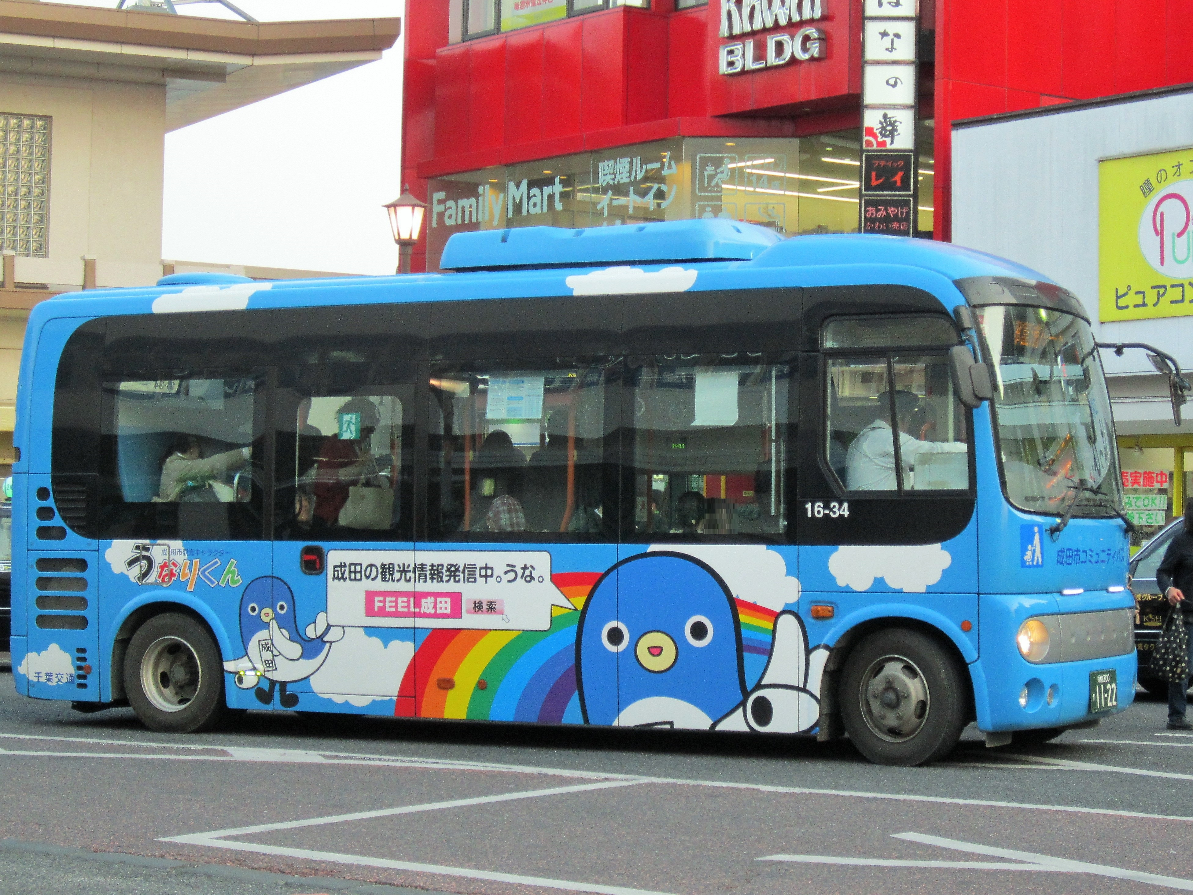 成田市コミュニティバス（京成成田駅前） Canon PowerShot A2200